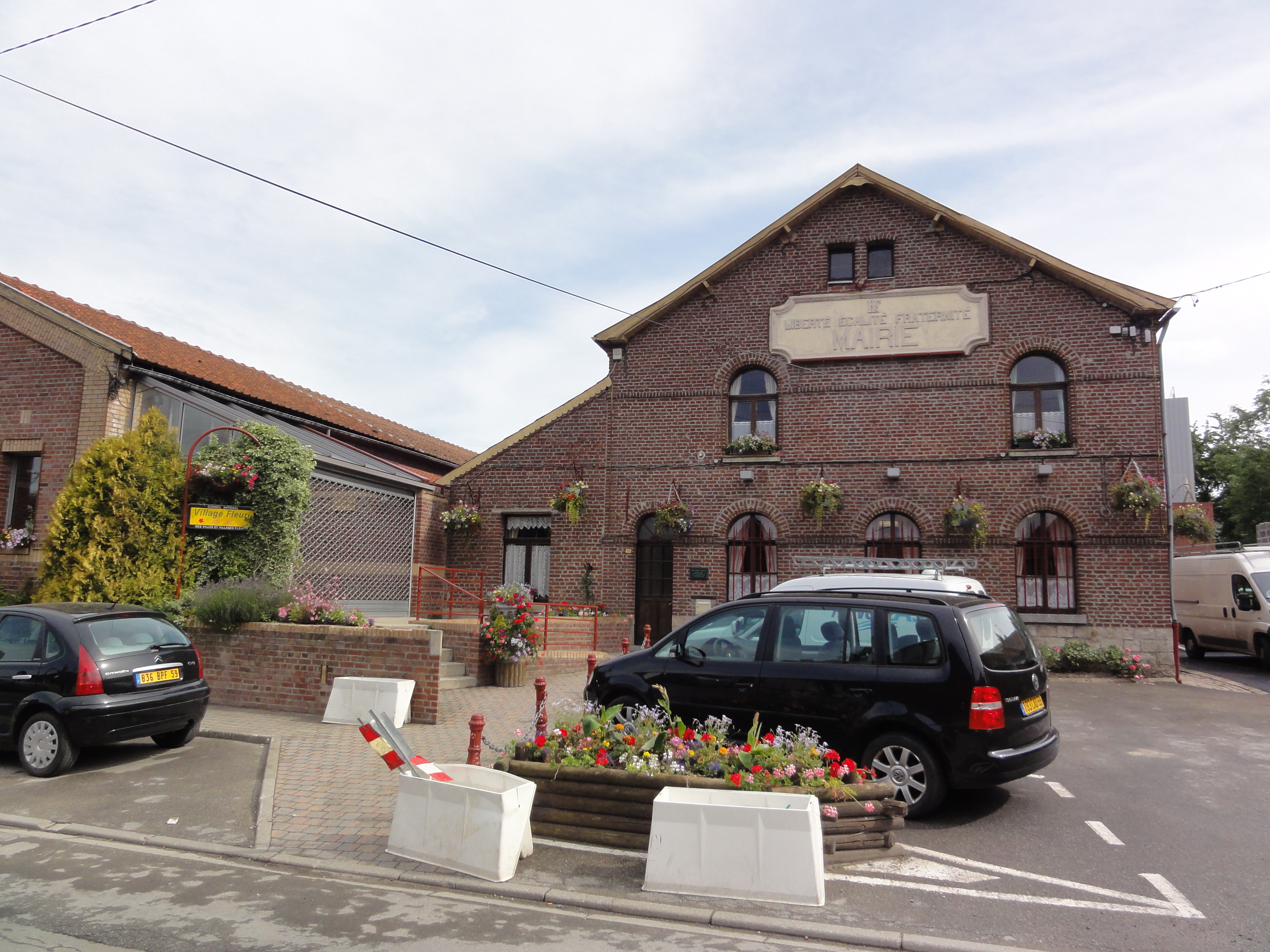 Villers-Pol (Nord, Fr) mairie